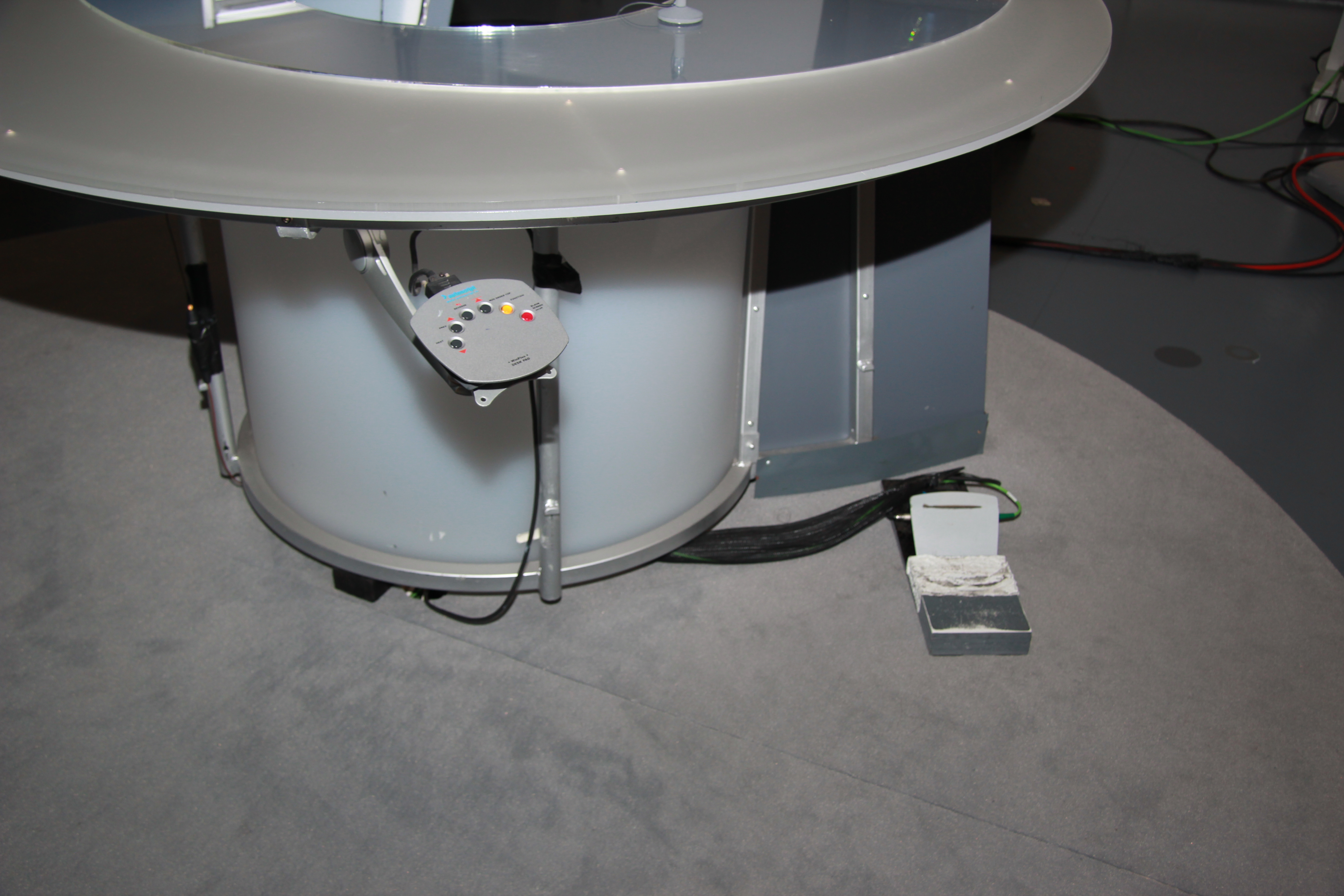 ORF-Landesstudio Salzburg